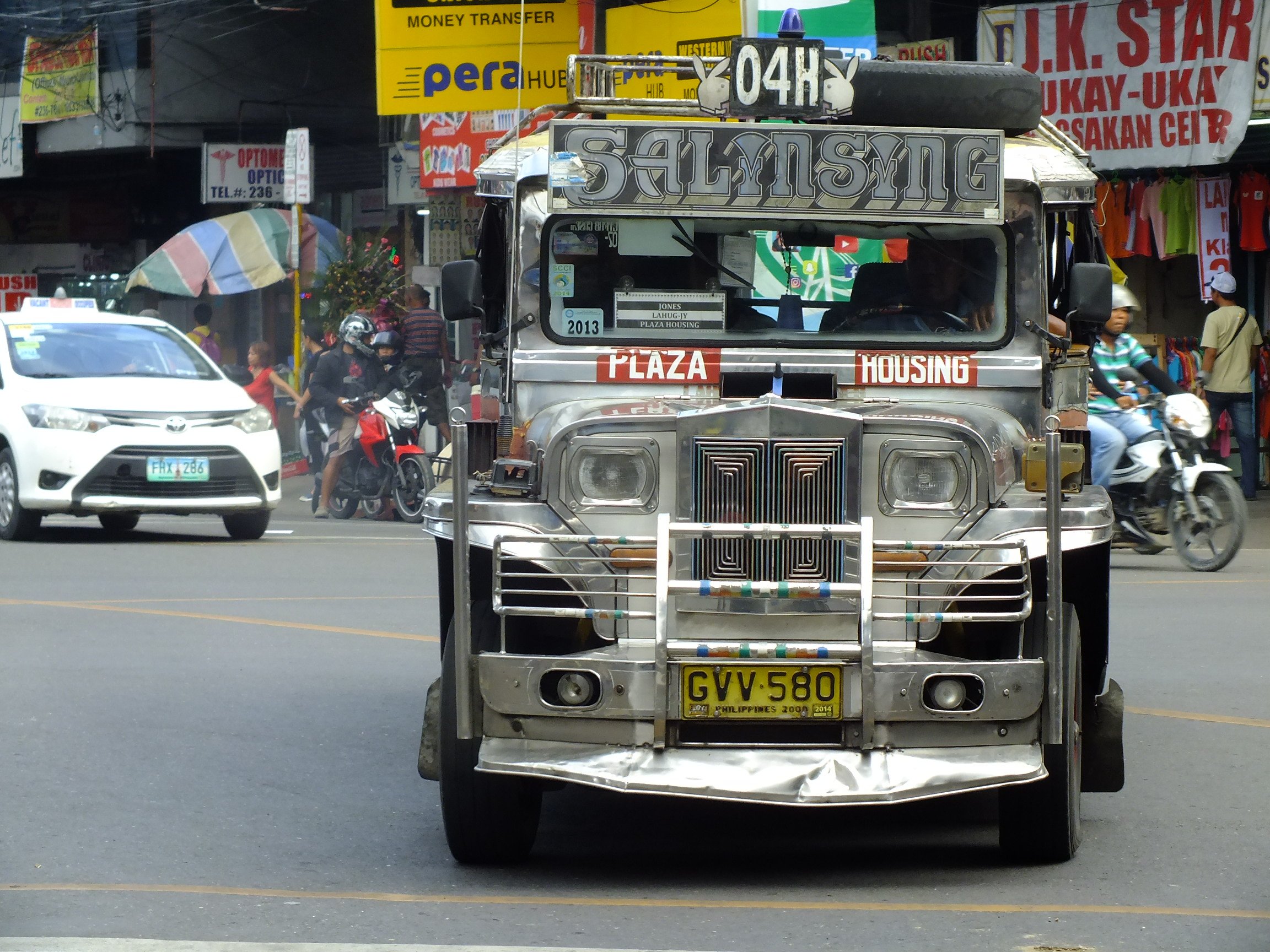 2016-09-27Jeepney in Cebu City